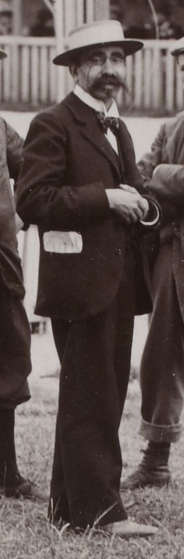 [Collection Jules Beau. Photographie sportive] : T. 5. Années 1897 et 1898 / Jules Beau : F. 32. Clérel, Darracq, Champion, Ellisson ; Guignard